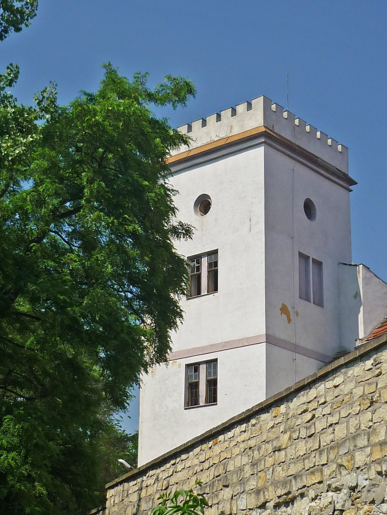 Wasserturm in Saaz (Žatec)